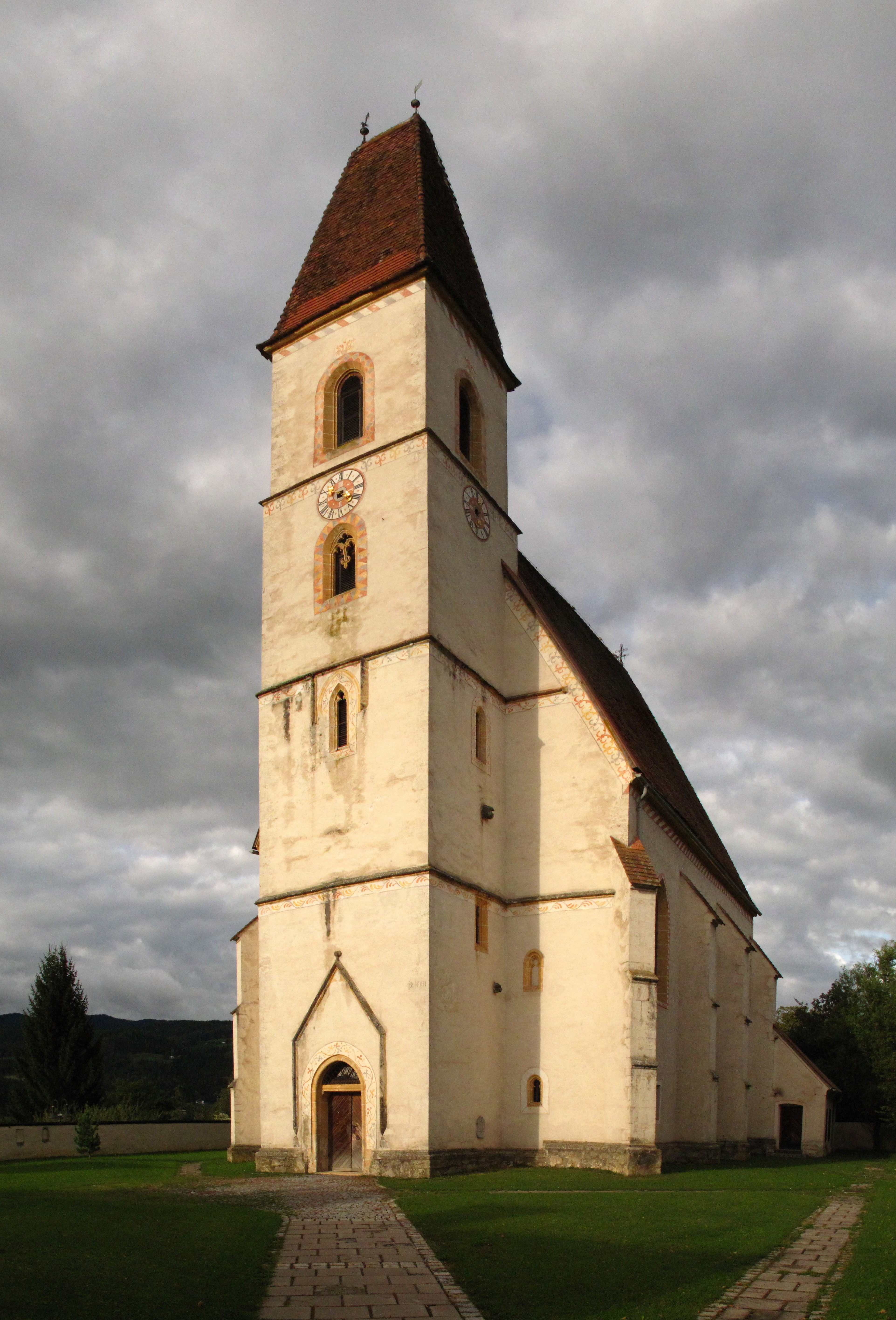 Kath. Pfarrkirche Allerheiligen, 8643 Allerheiligen im Mürztal, Allerheiligen im Mürztal 7